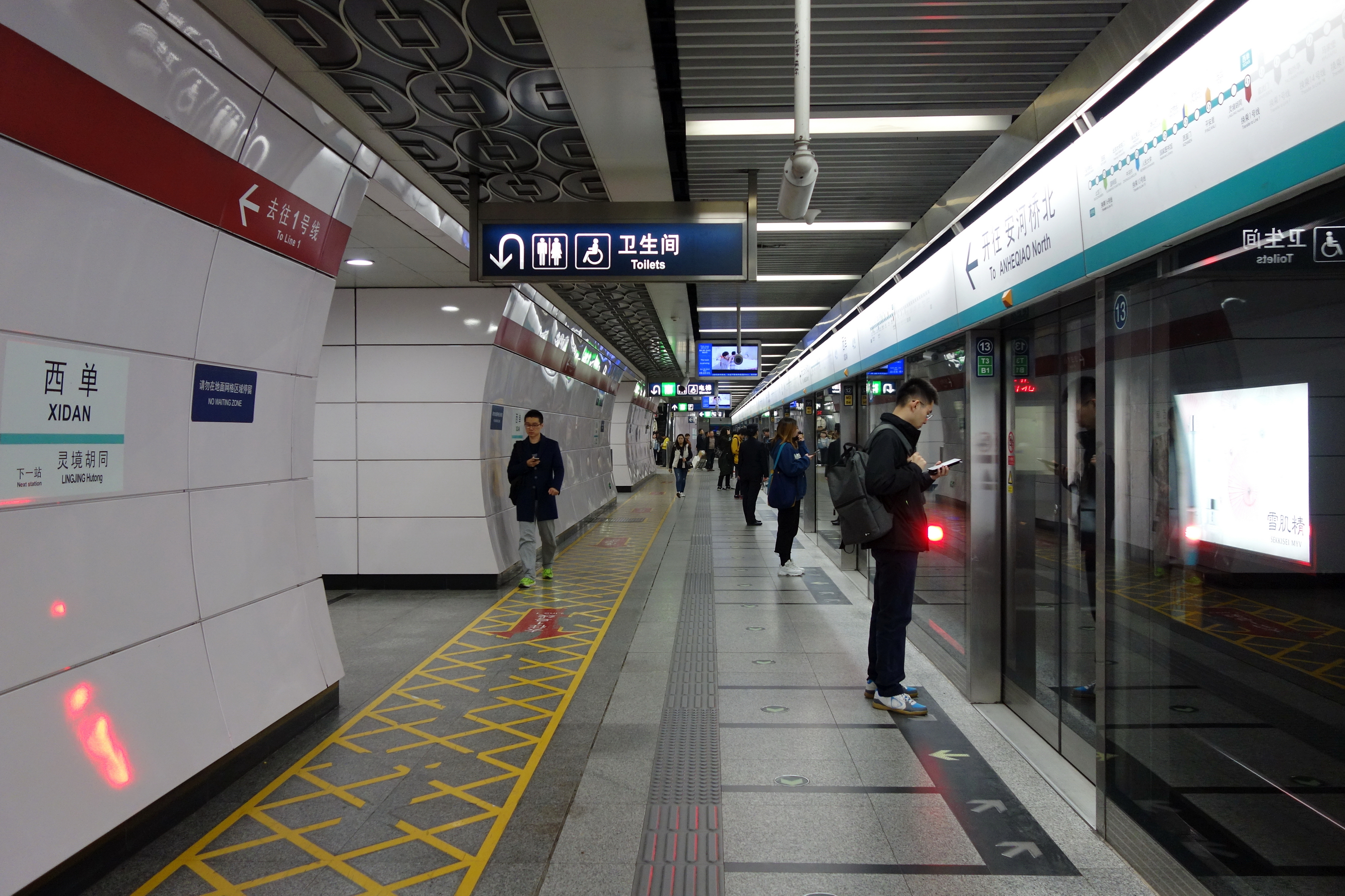 北京地铁4号线西单站分离式岛式站台（上行）。